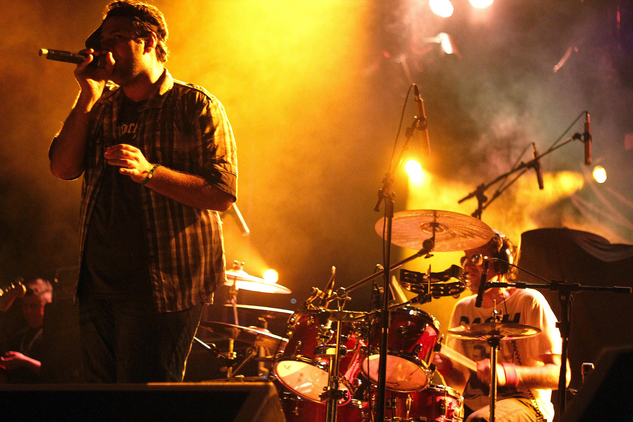 A banda Charlie Brown Jr. em apresentação no Pepsi on Stage em Porto Alegre.